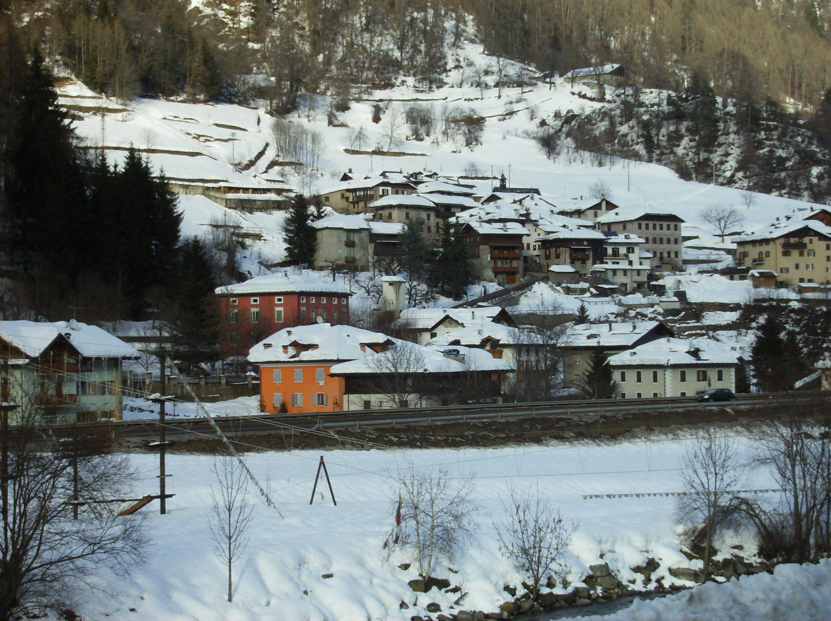 Hameau de Mestriago - Commezzadura- Italie